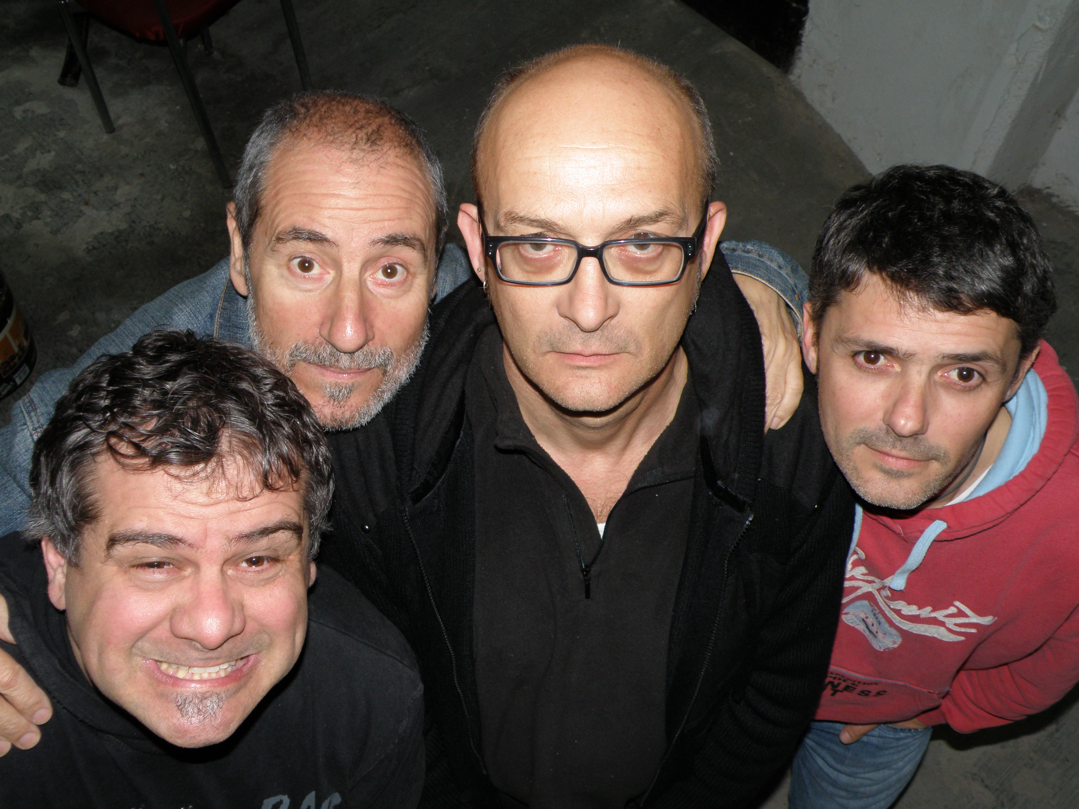 Formación actual de Puretones, con Josep Villada (guitarra) substituyendo a Agustí Canet. Foto de Maria Teixidor